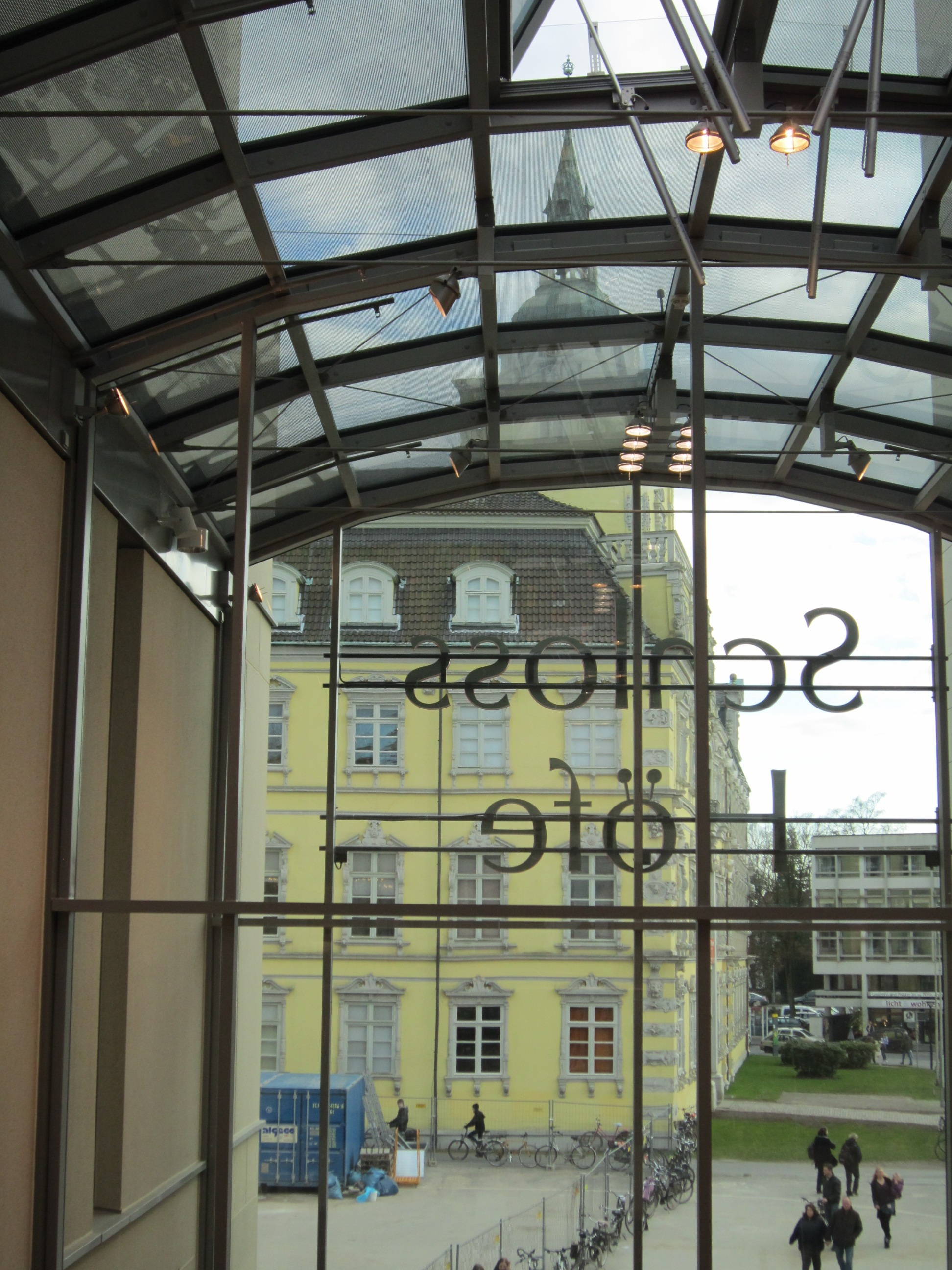 Residenzschloss Oldenburg, betrachtet von der Einkaufsgalerie Schlosshöfe aus